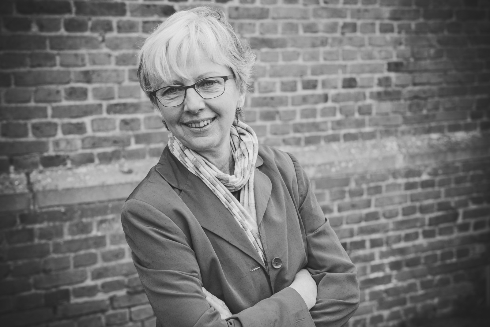 Dr. Barbara Müller, Engagierte Friedens- und Konfliktforscherin, Moderatorin, Organisationsentwicklerin und Coach, in Wahlenau, Hunsrueck